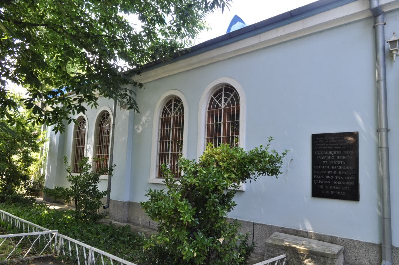 Храм „Свети Пантелеймон“, кв. Княжево, София